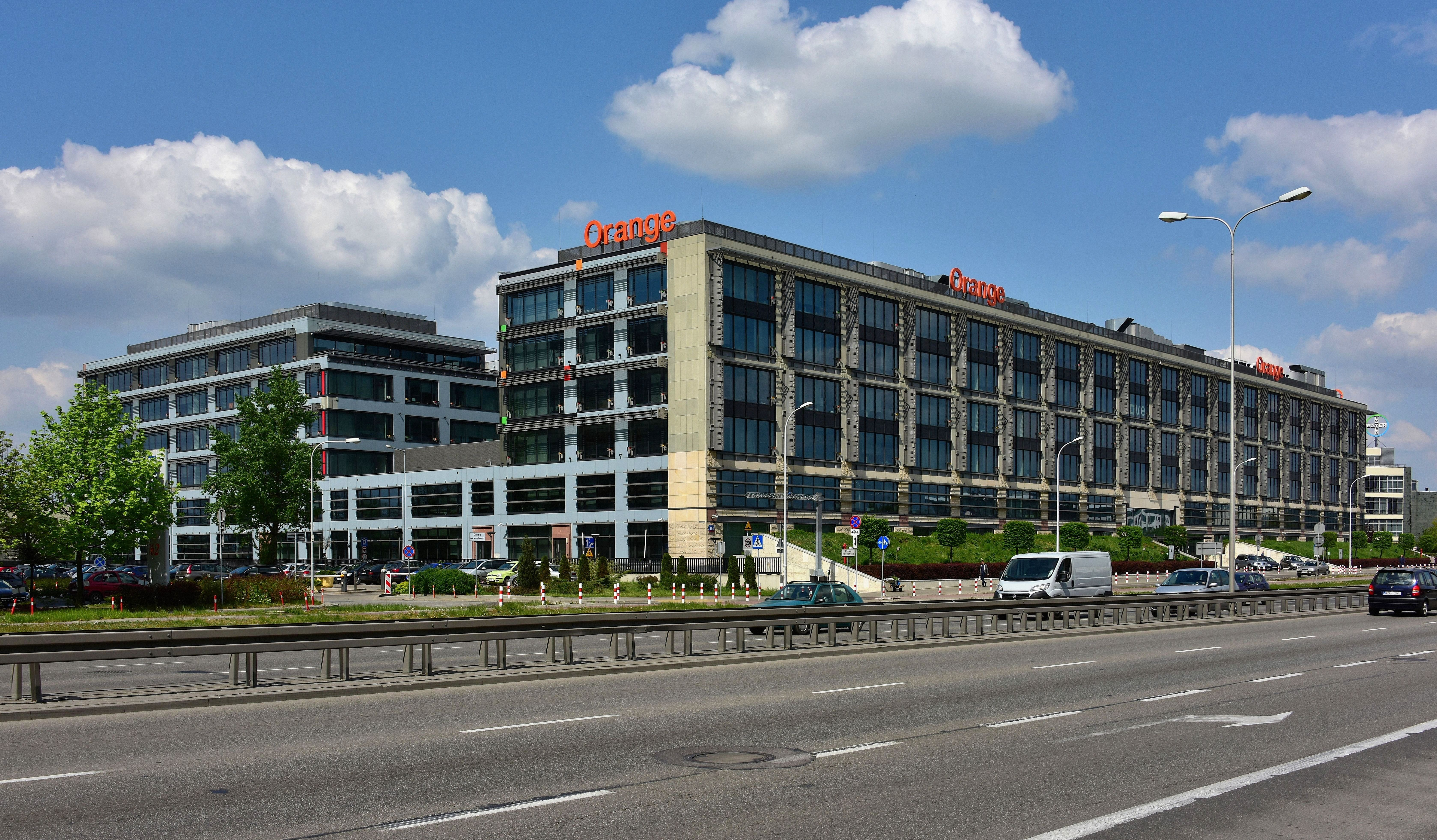 Siedziba spółki Orange w Alejach Jerozolimskich 160 w Warszawie